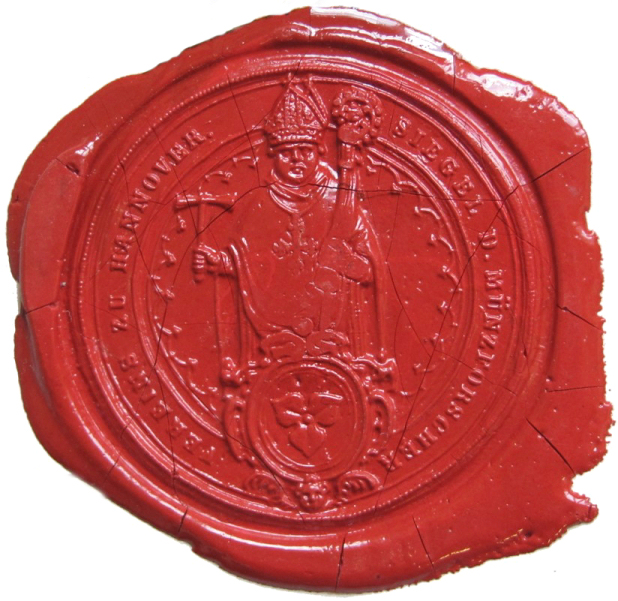 Siegel des Münzforschungsverein, dem Vorläufer der Numismatischen Gesellschaft zu Hannover, aus dem 19. Jahrhundert. Dargestellt ist der Heilige Eligius (589–659 n. Chr.), der Schutzpatron u. a. der Münzsammler. In der Rechten hält er einen Hammer als Zeichen der Goldschmiedekunst, in der Linken den Bischofsstab. Im Rundschild ist die Marienblume von Hannover dargestellt, deren symbolische Bedeutung immer noch diskutiert wird.